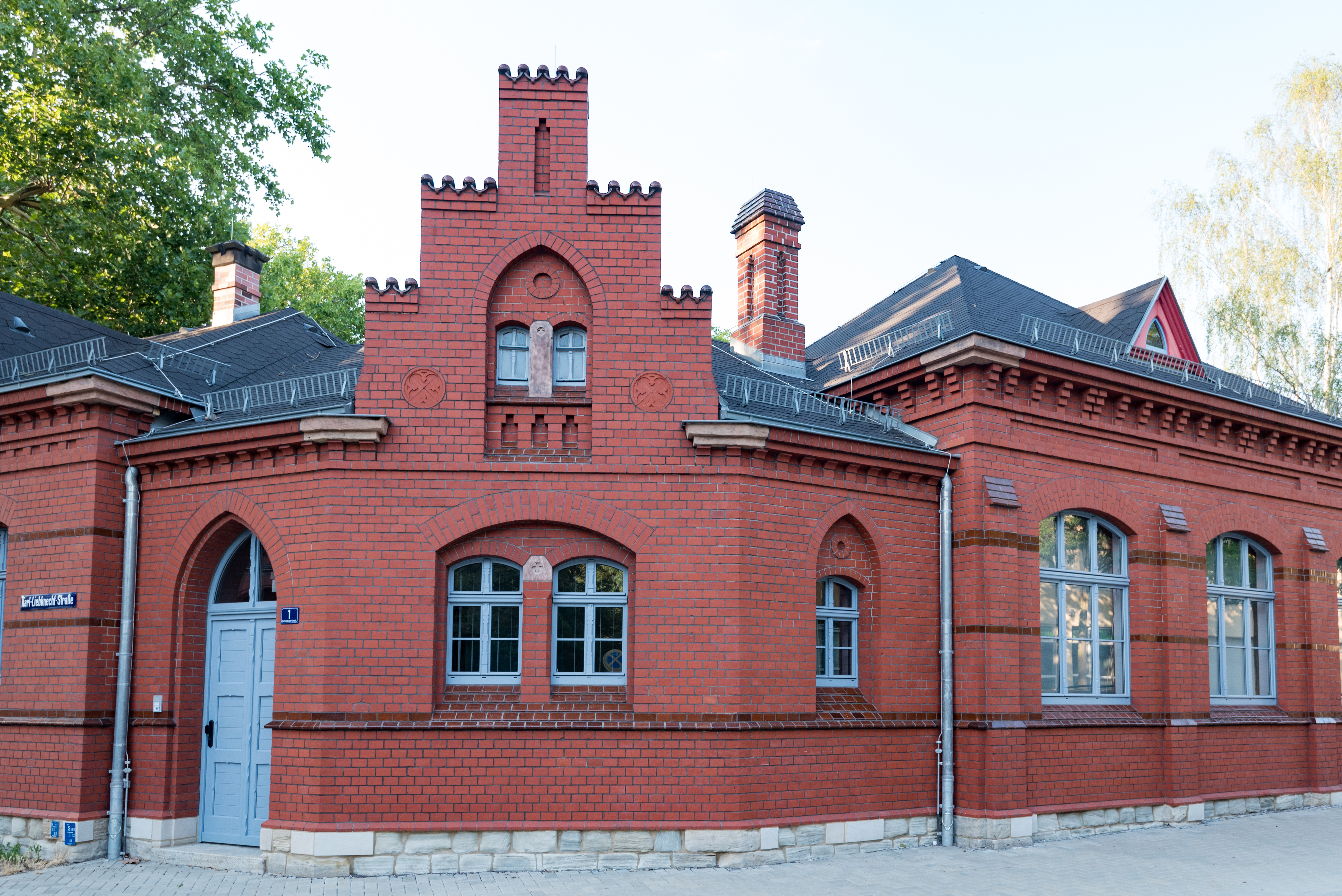 Weißenfels, Karl-Liebknecht-Straße 1